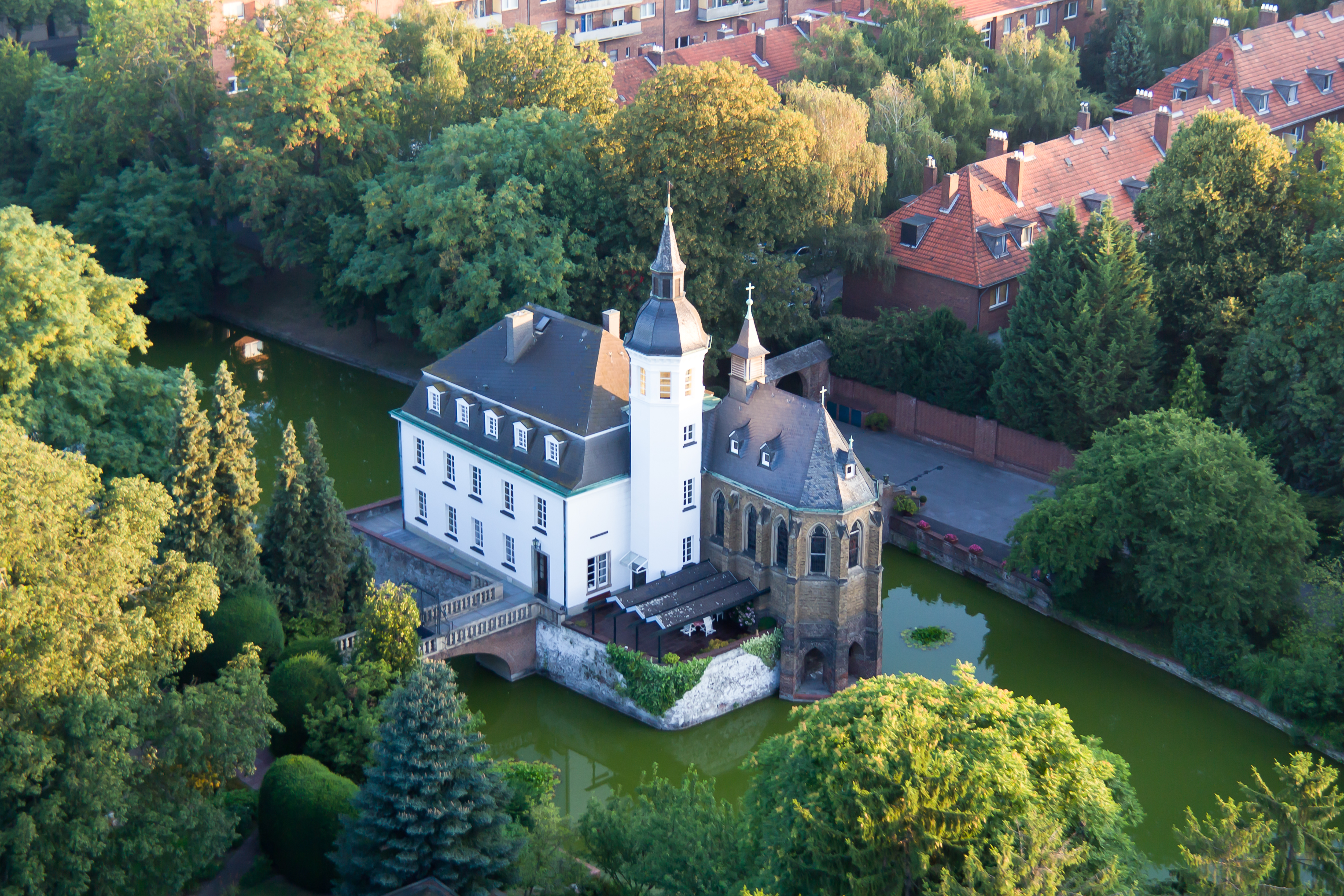 Ballonfahrt über Köln - Wasserschloss Weißhaus